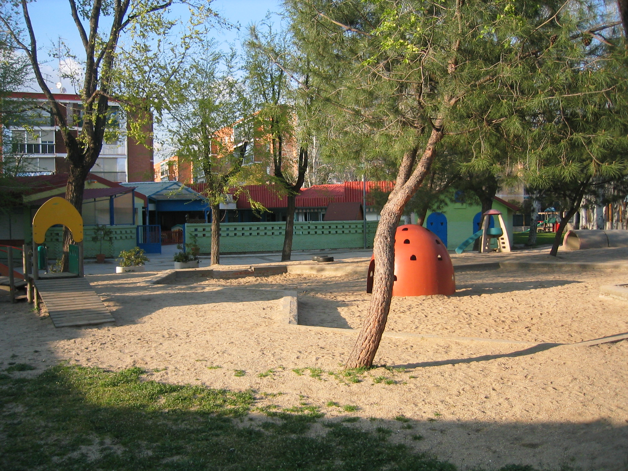 Escuela Infantil Municipal Jeromín, en el barrio de San Nicasio, Leganés (Madrid, España).